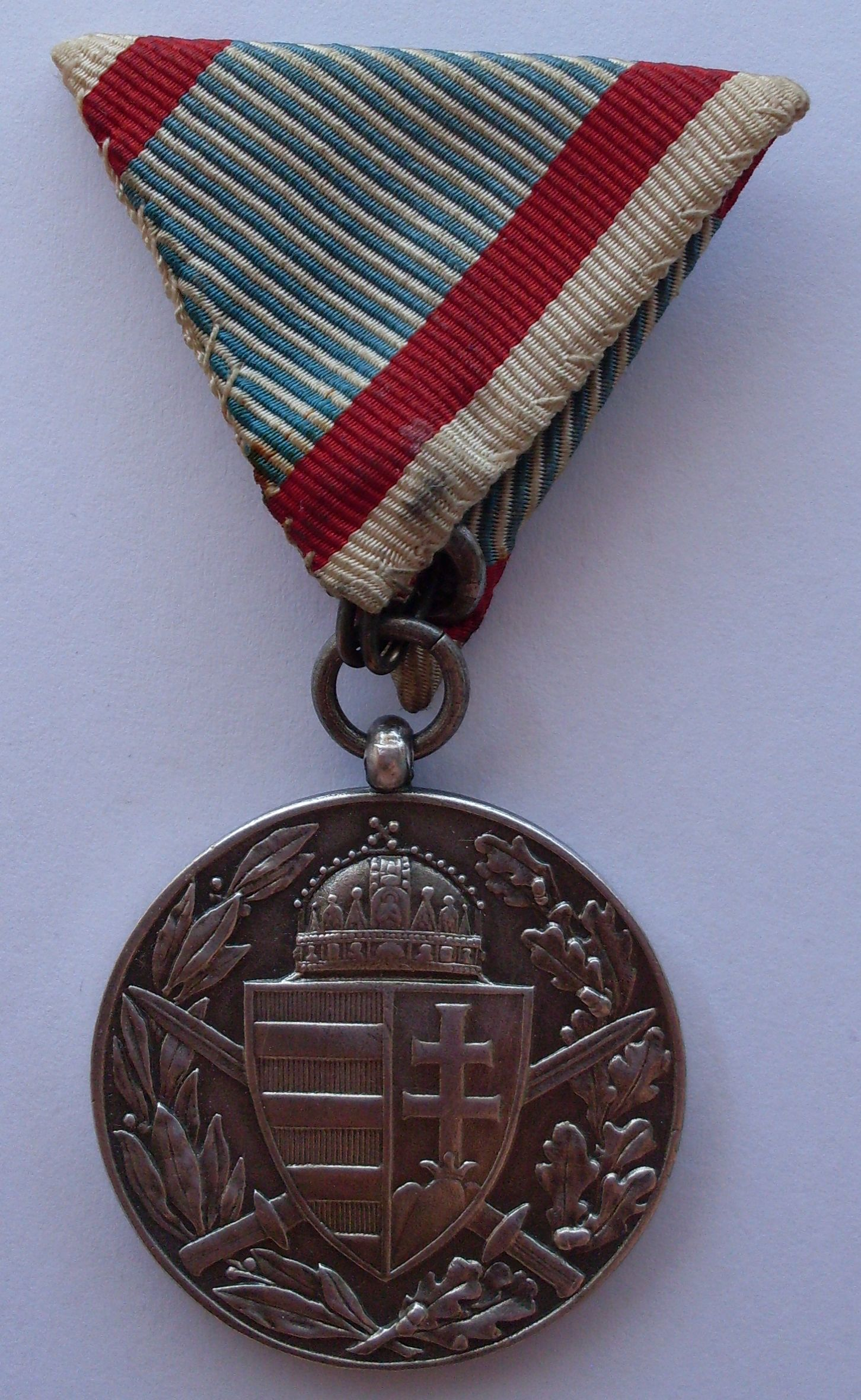 Vorderseite der ungarischen Weltkriegs Erinnerungs Medaille